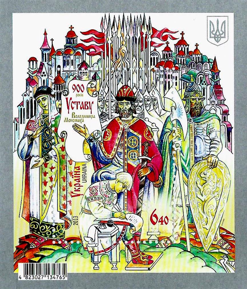 Timbre ukrainien commémoratif du 900e anniversaire de l'accession de Volodimir (Vladimir) Monomakh au trône de la Rus' de Kiev